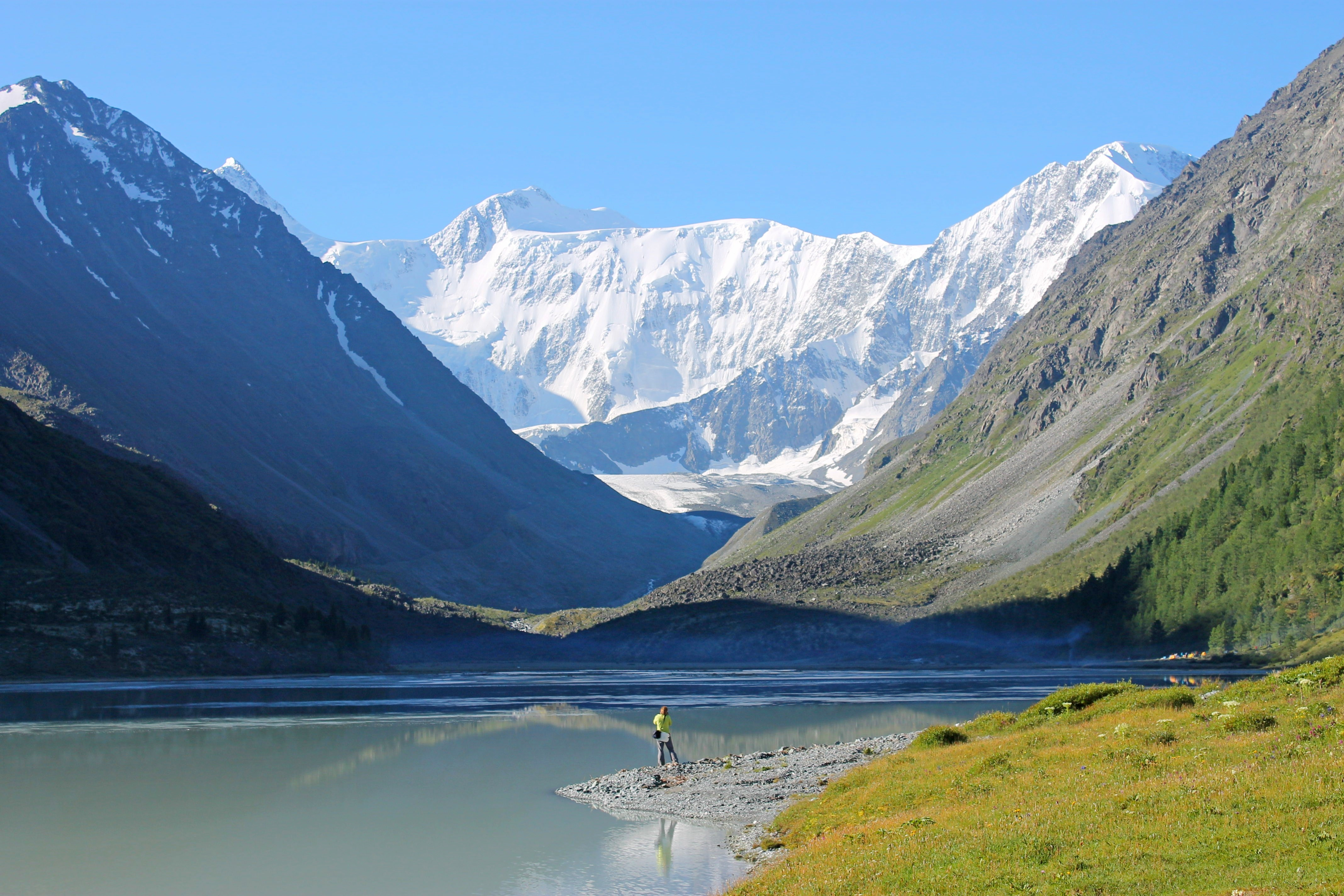 Белуха, Усть-Коксинский район This image is related to the protected area of Russia number 0410040